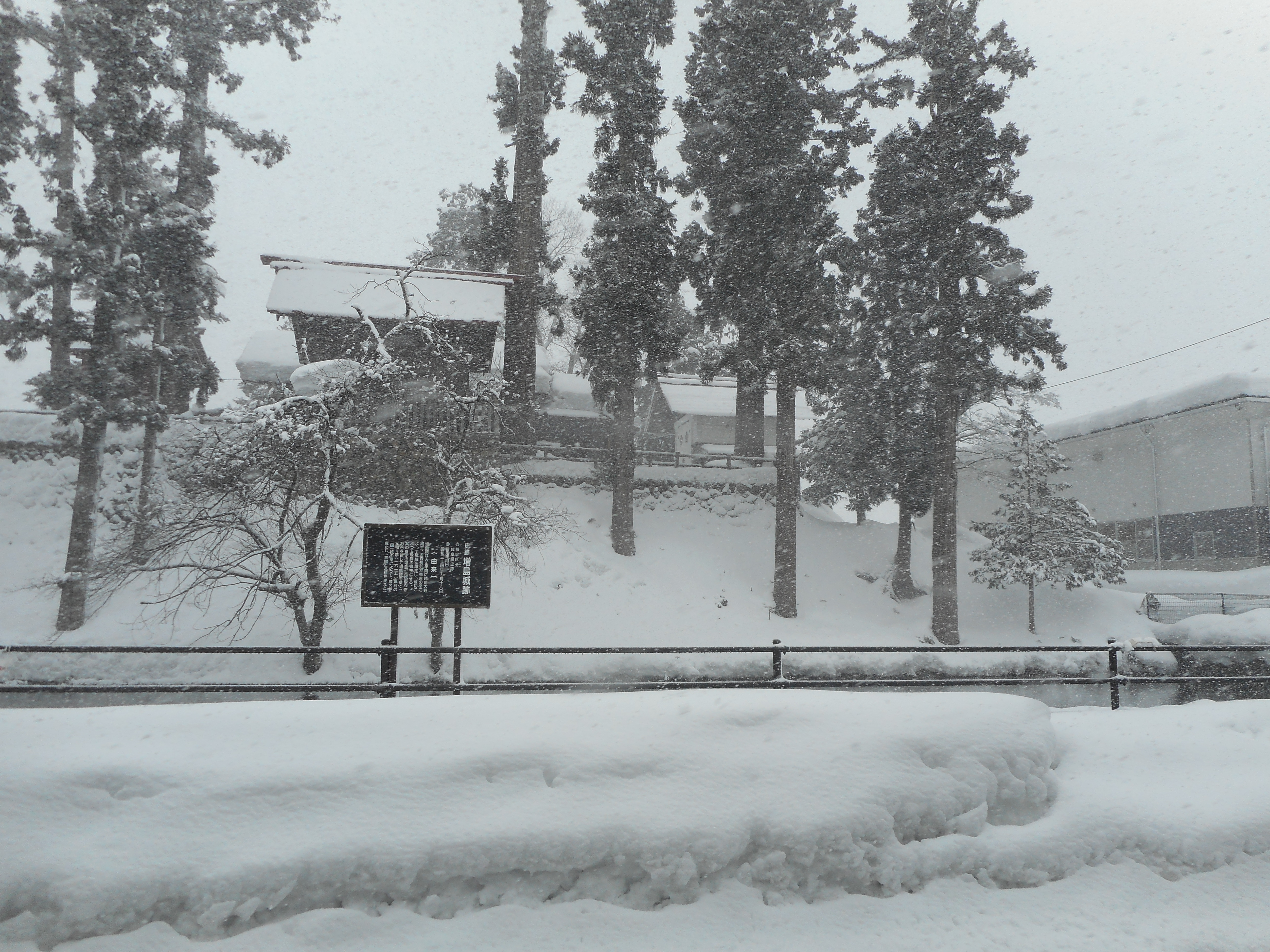 増島城跡に建つ増島天満宮